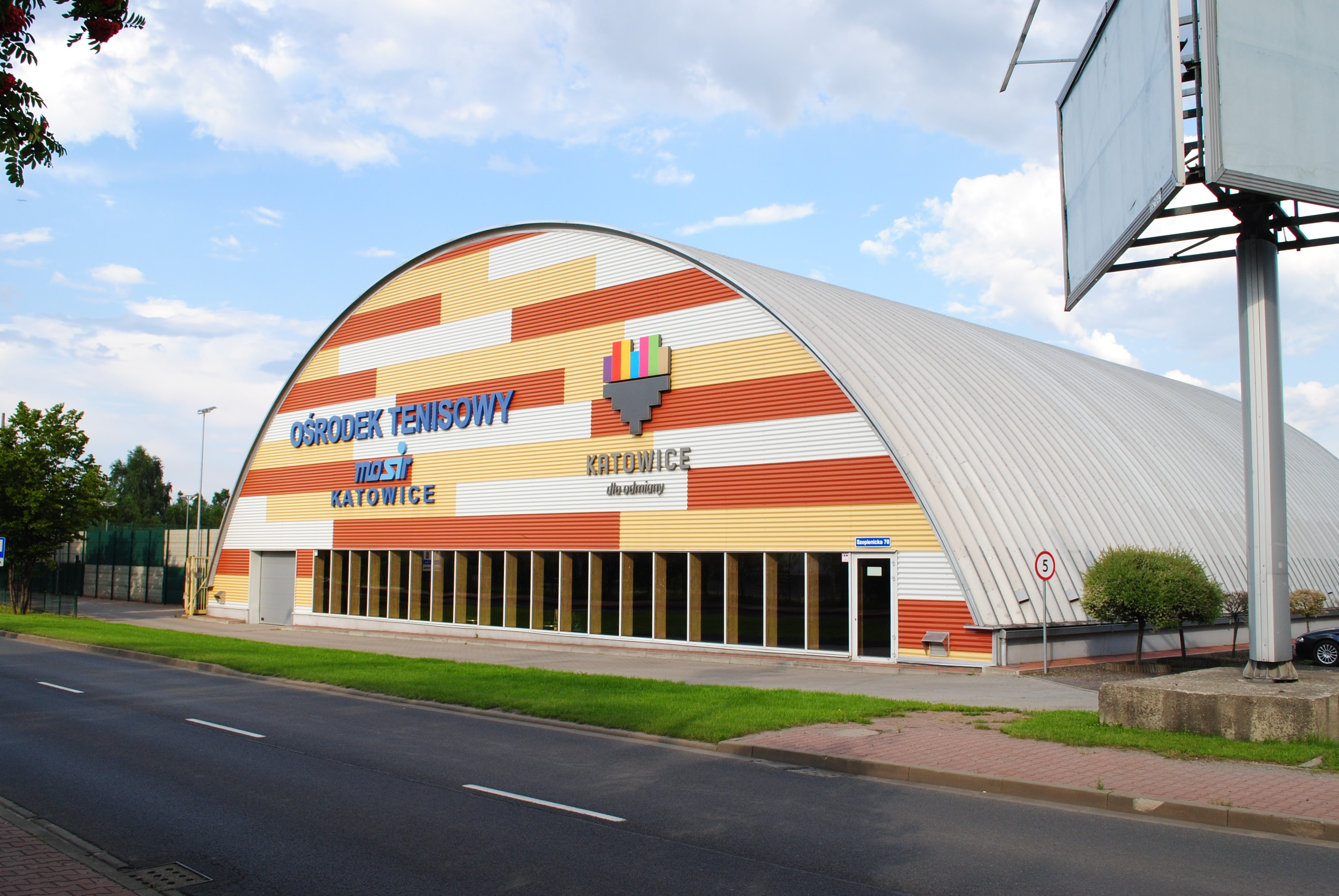 Katowice - Janów-Nikiszowiec. Ośrodek tenisowy MOSiR